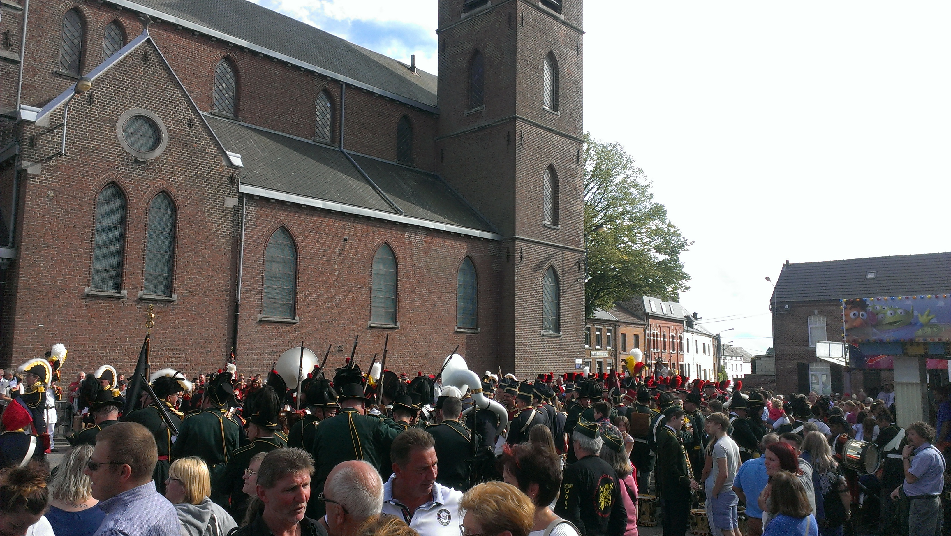 Marche Saint-Christophe naast de gelijknamige kerk in Marbaix-la-Tour, op zondag 30 juli 2017.